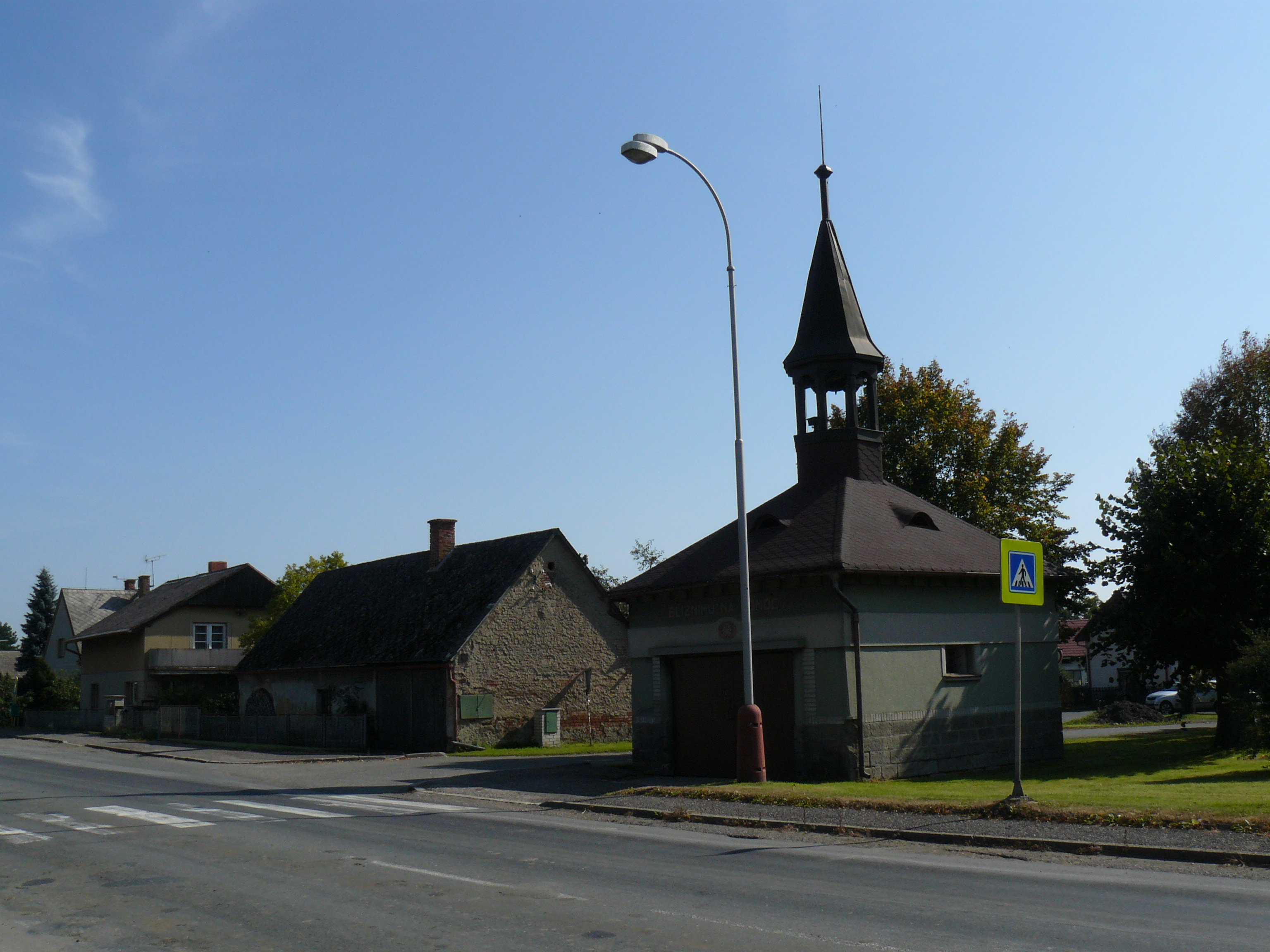 Sukorady (okres Mladá Boleslav)